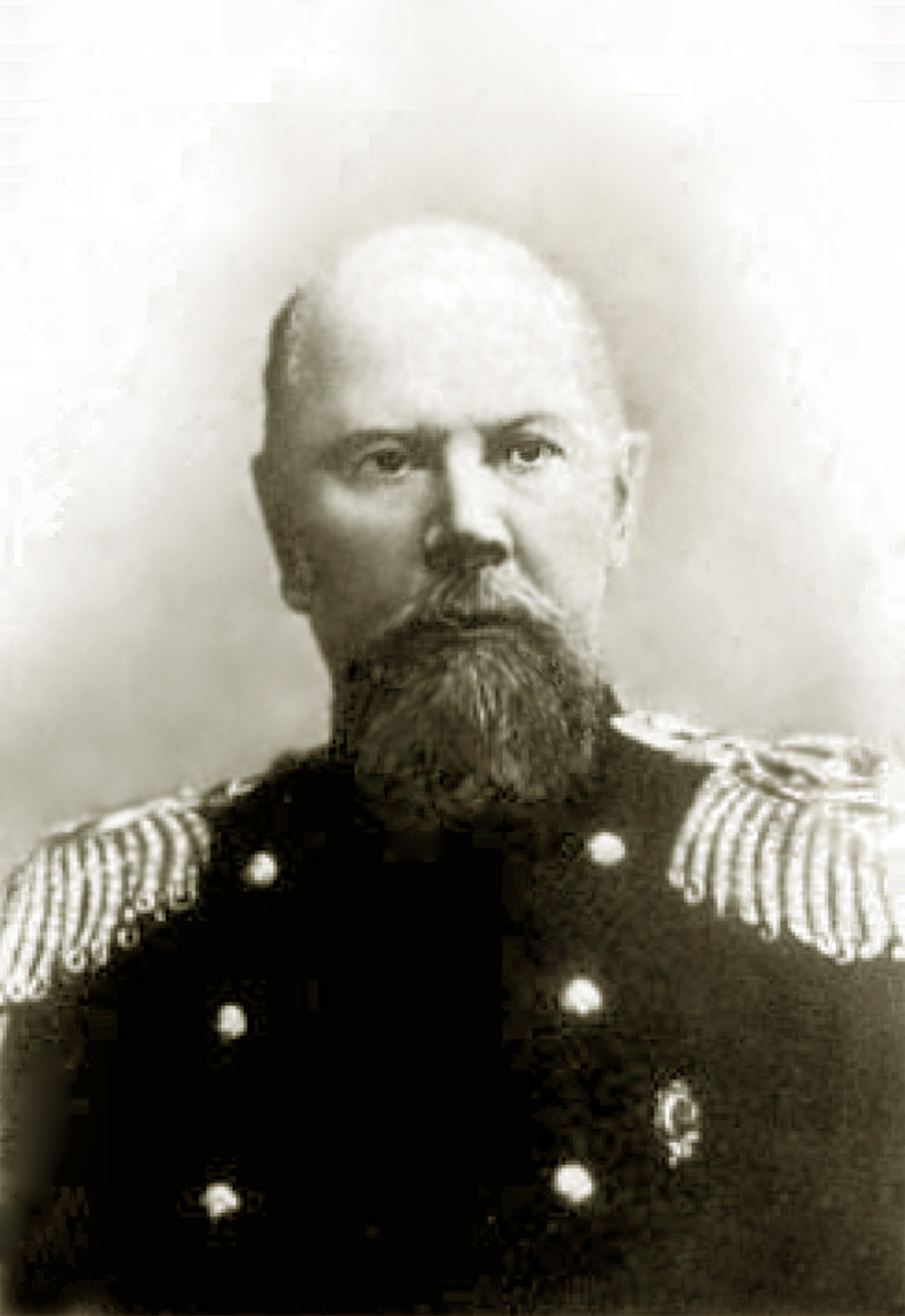 Николай Иванович Быстров (1841—1906) — русский педиатр.